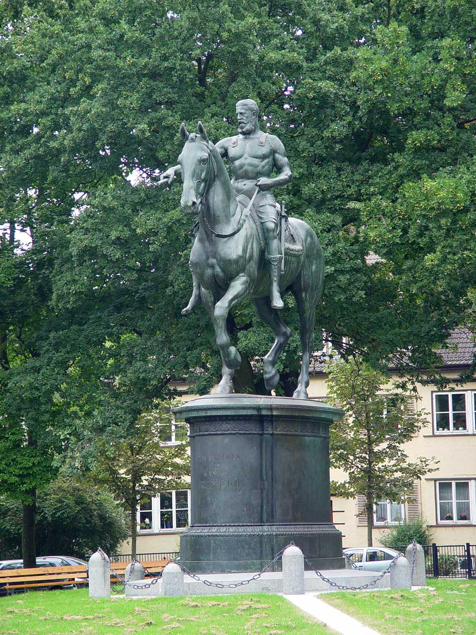 Kaiser Friedrich III., Statue von Louis Tuaillon. Standort: Bremen, Herrmann Böse Str.